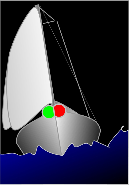 Segelboot mit Zweifarbenlaterne